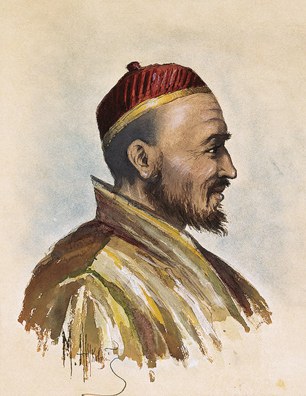 Doctor Pyotr Badmaev (1851—1920)